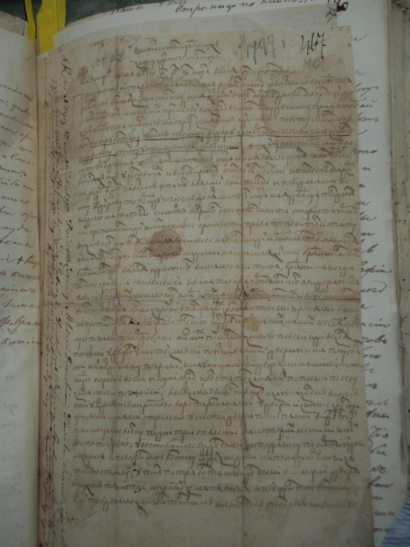 Выпис с книг кгродских замку господарского Киевского от 04. 07. 1576. Лист 1 (оригинал). ГАЖО Дело Левковских.